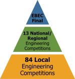 Piramide de la Competición EBEC